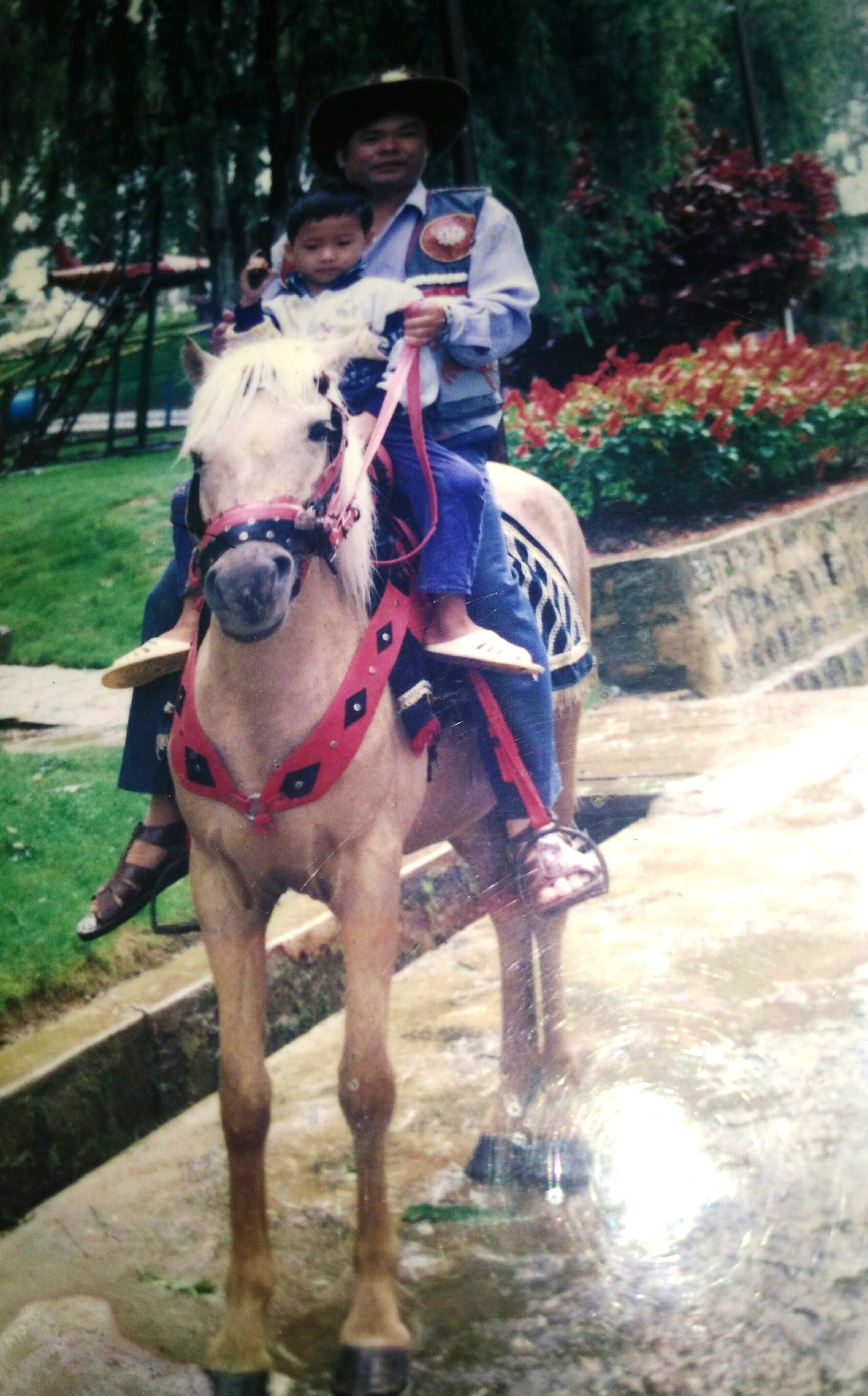 Hình tự chụp bằng điện thoại cá nhân về một tấm hình gia đình cưỡi ngựa Đà Lạt khi du lịch vùng Đà Lạt năm 1998, để minh họa cho bài viết cùng chủ đề